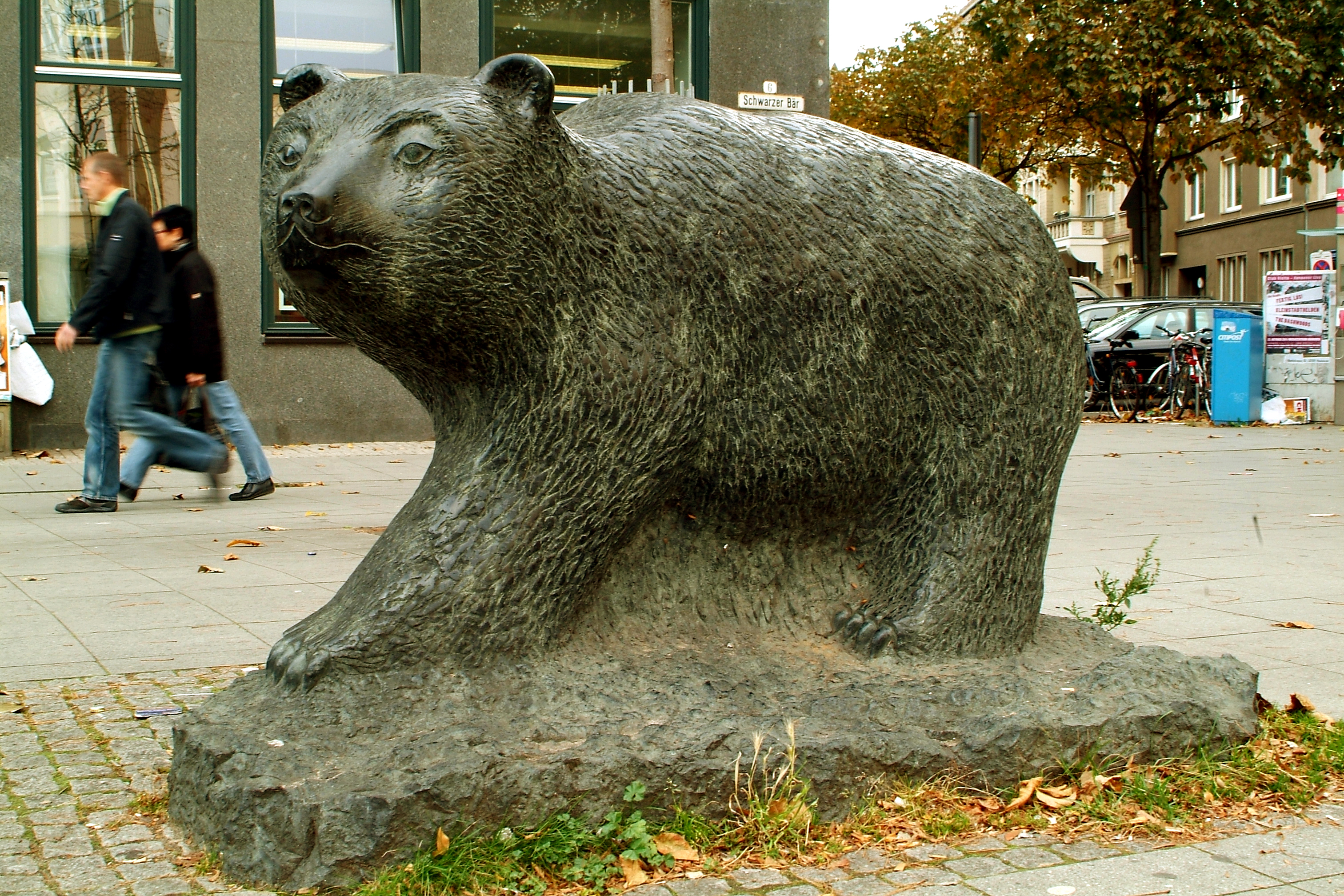 Die Skulptur eines Schwarzen Bären, aufgestellt auf dem Platz Schwarzer Bär in Hannover